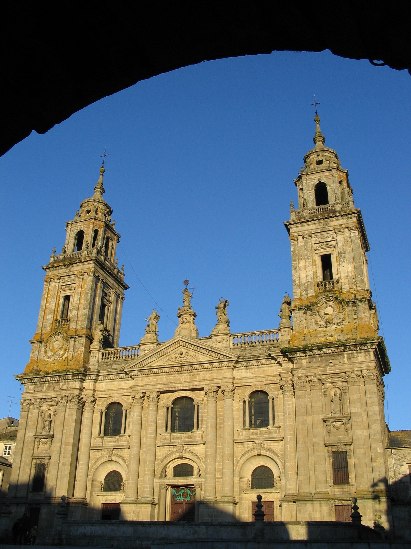 Lugo